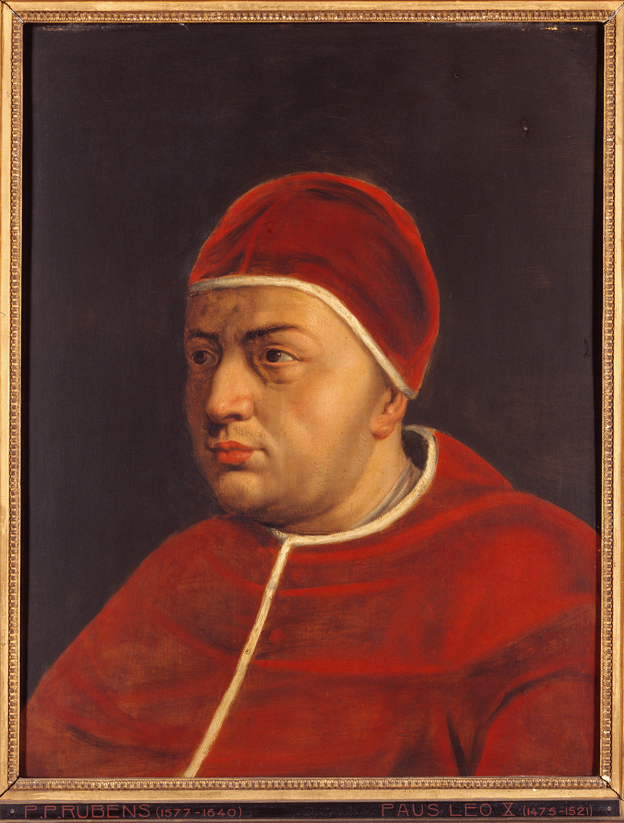 schilderij ( Peter Paul Rubens ( Museum Plantin-Moretus